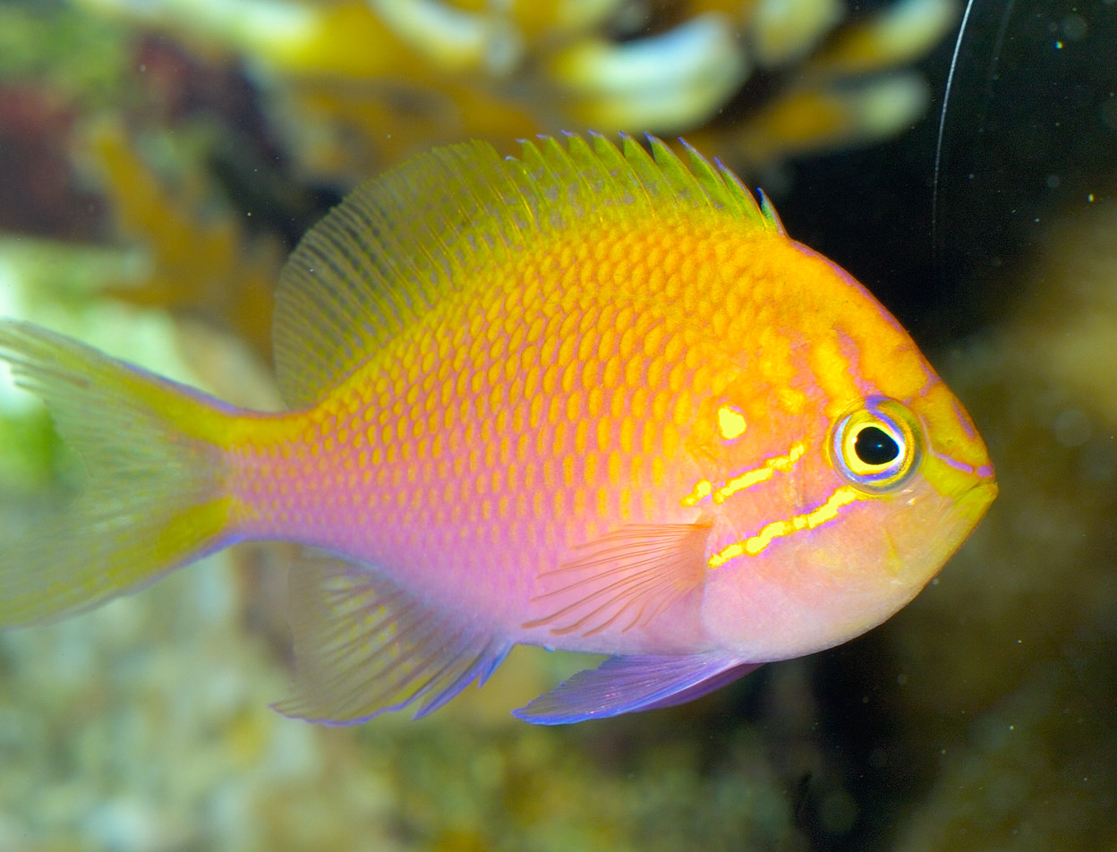 Serranocirrhitus latus in an aquarium